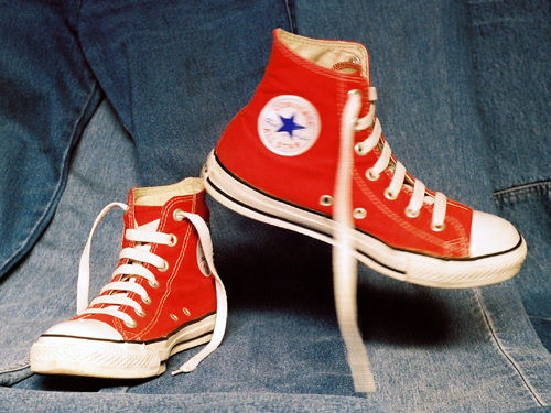 Zapatillas marca Converse frente a un fondo de denim.